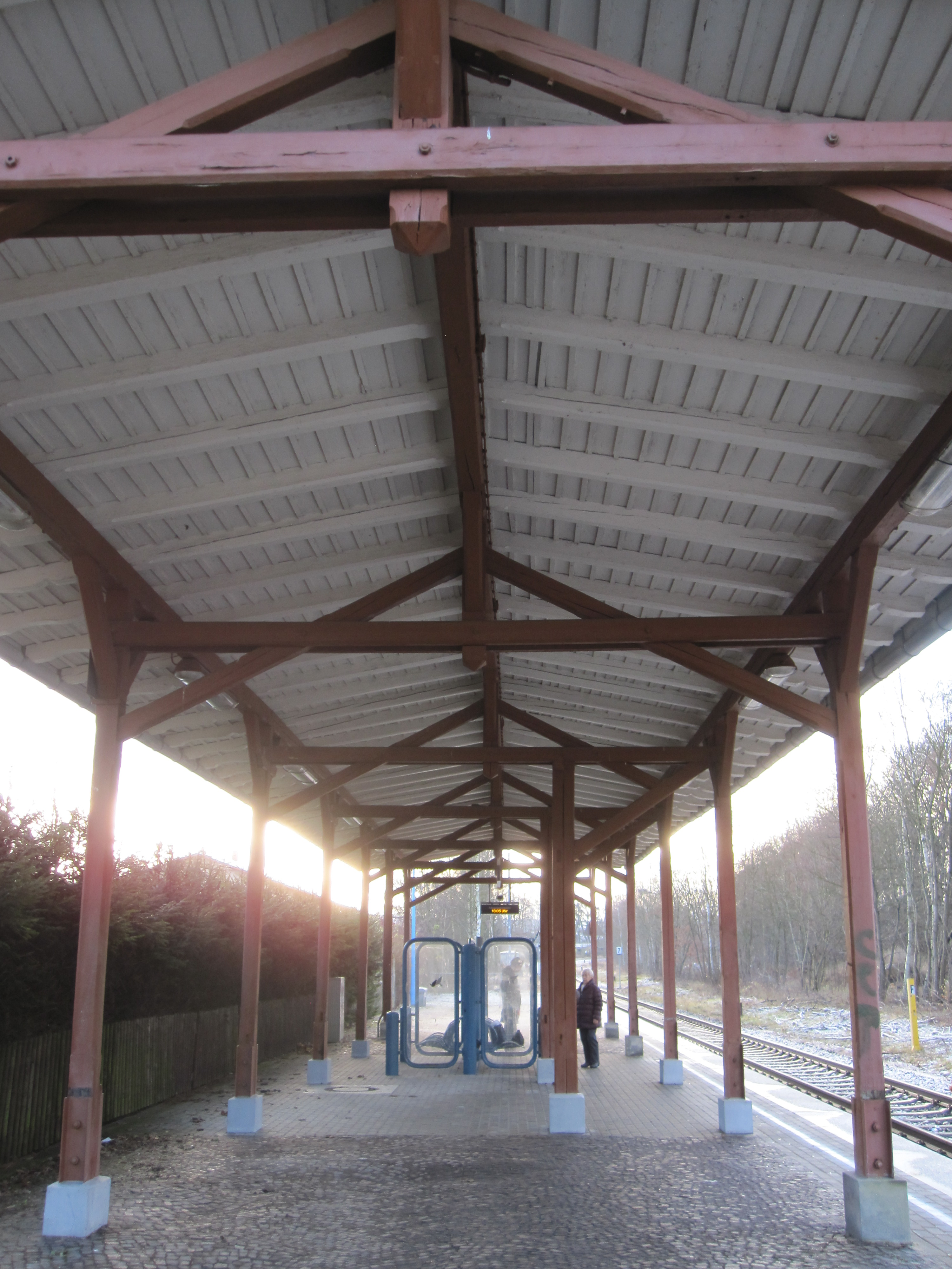 Rodewisch: Bahnhof und Ausblicke vom Bahnhof in die Umgebung bis ins Erzgebirge.